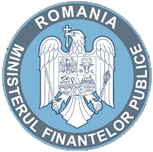 Stema Ministerului Finantelor Publice.